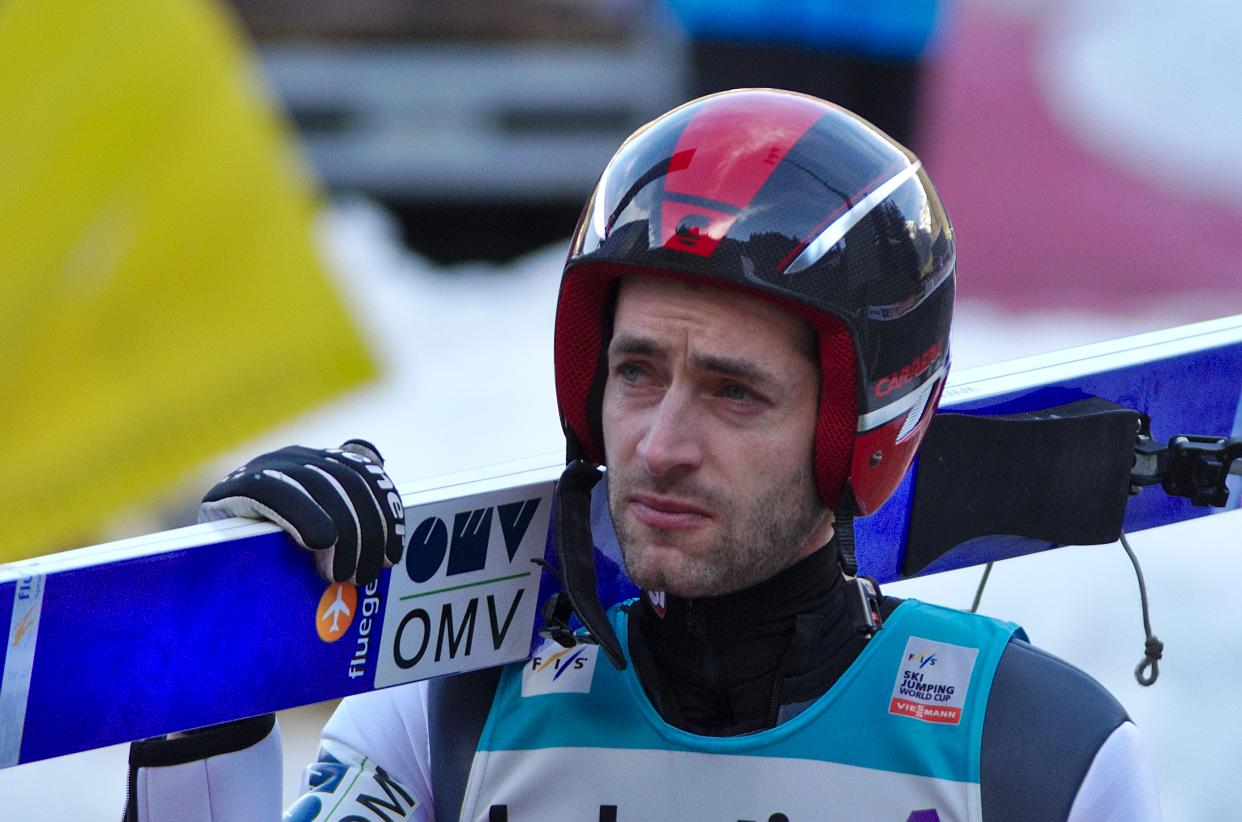 FIS Ski Jumping World Cup 2014 - Engelberg - 20141221 - Wolfgang Loitzl